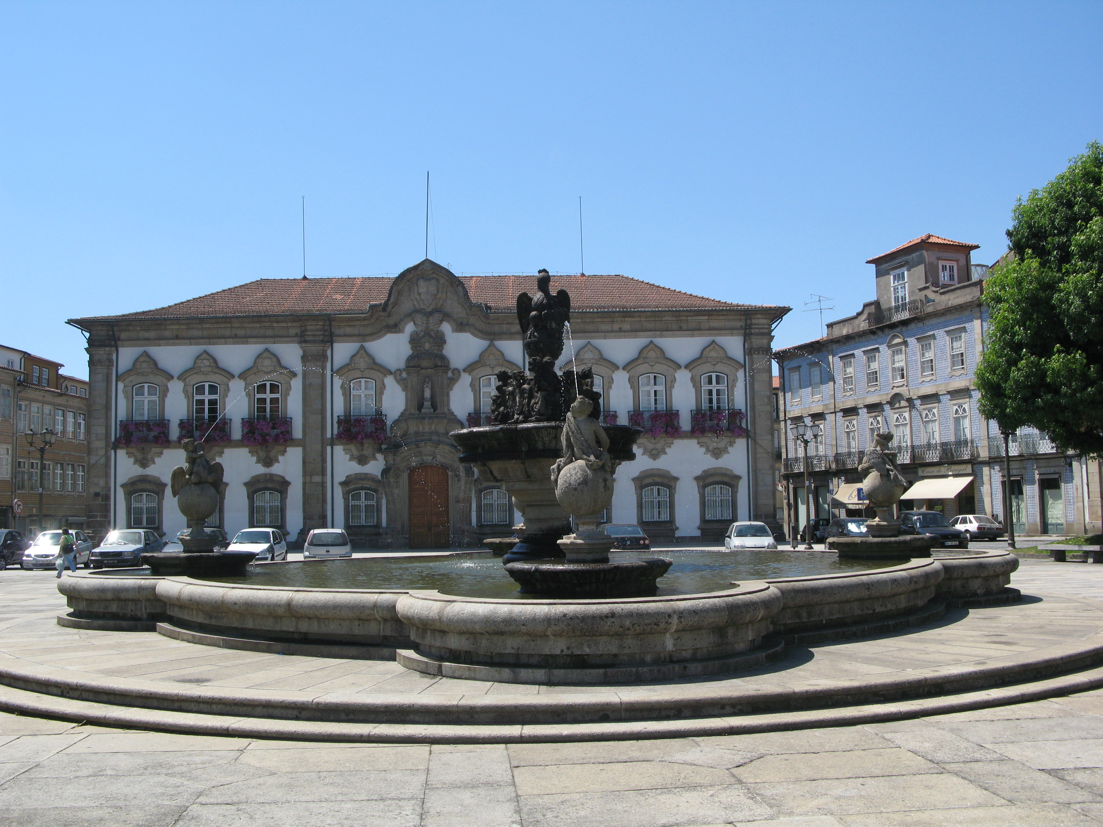 Câmara Municipal de e Fonte do Pelicano, localizadas nos Paços do Concelho de Braga.